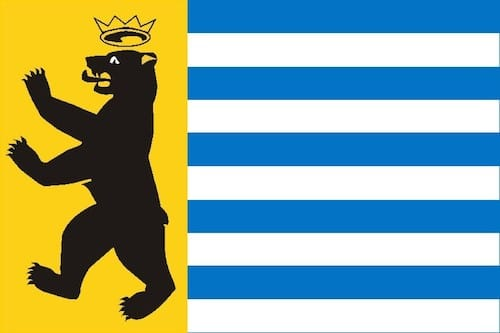 Drapeau de Dinard avec un ours. Fondé en 1997 par la société bretonne de Vexillologie, le drapeau reprend l'emblème traditionnel de la ville, chargé d'un ours couronné dessiné par la styliste Jakez Derouët.